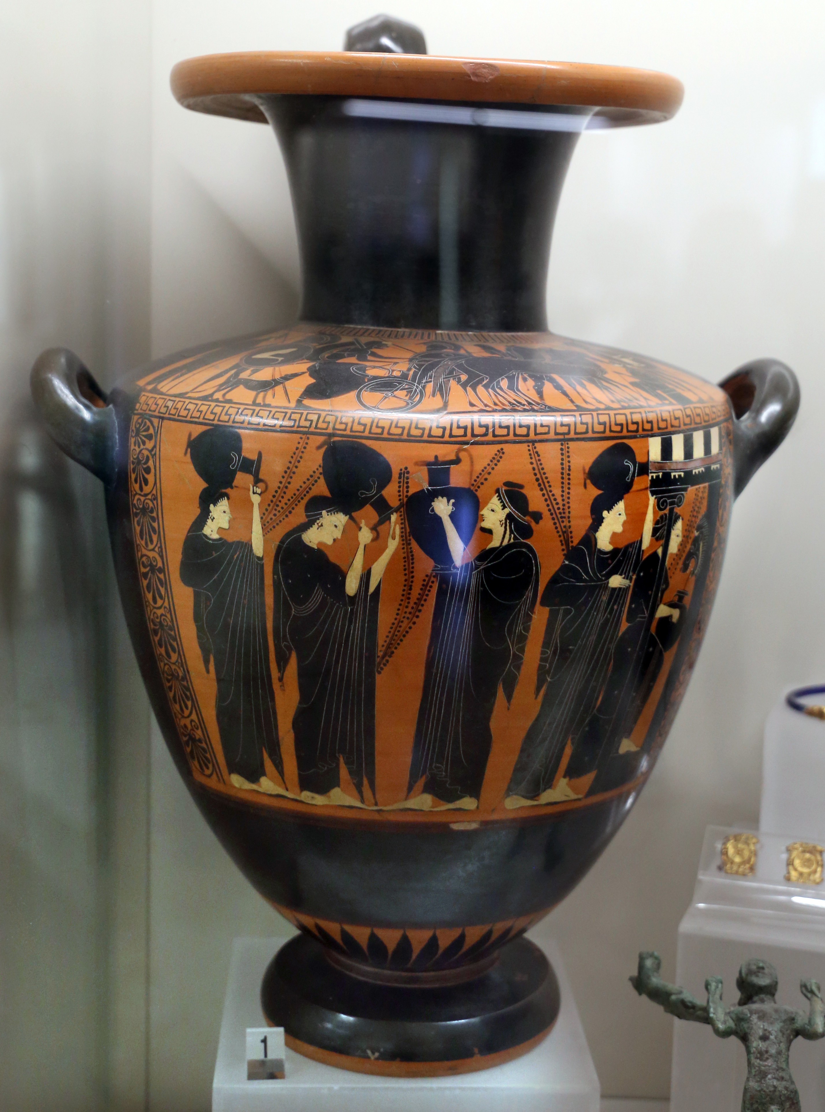 Museo nazionale etrusco di Villa Giulia This is a photo of a monument which is part of cultural heritage of Italy.